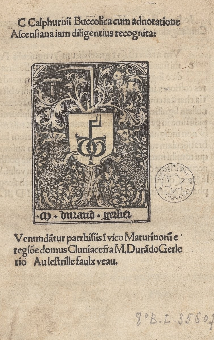 Calphurnii Buccolica title page